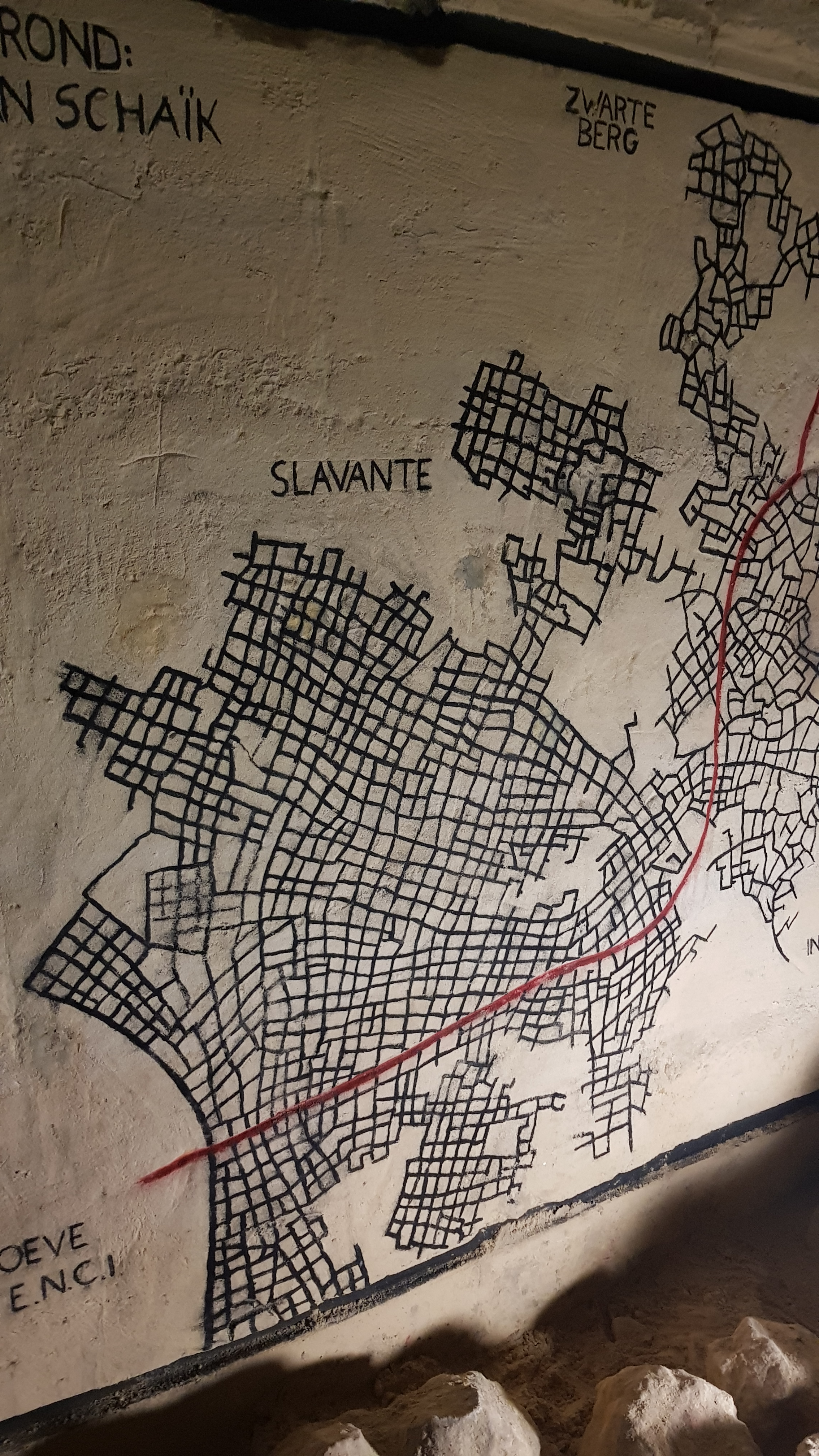 Noordelijk Gangenstelsel in de Sint-Pietersberg, Maastricht, Nederland